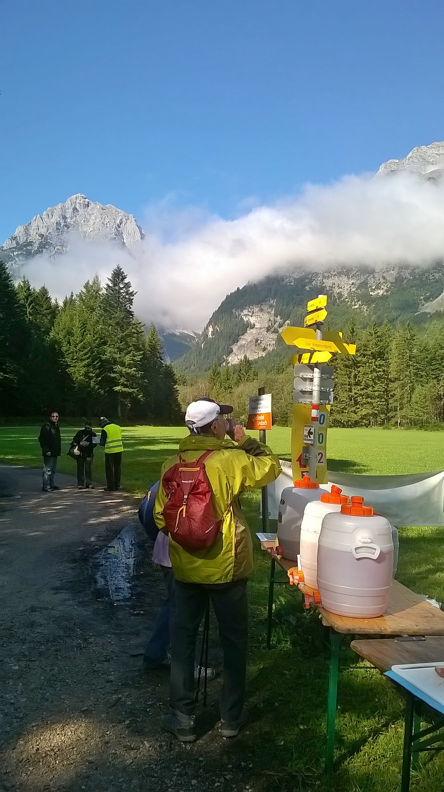 Internationaler 3-Tage-Einhornmarsch, Olympiaregion Seefeld in Tirol, Versorgungungs- und Kontrollpunkt an einer der 20km-Etappen 2017.